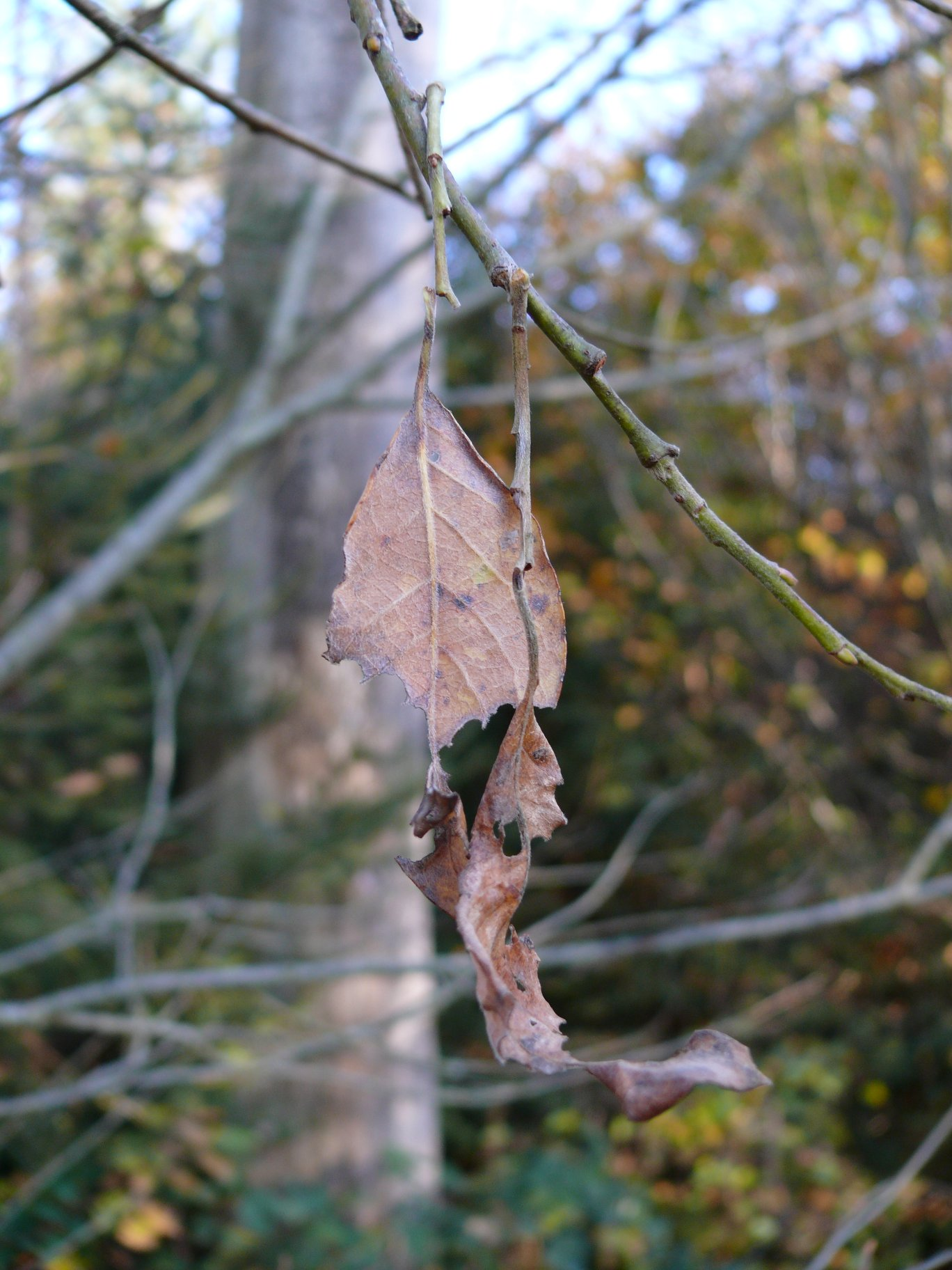 Apatura iris